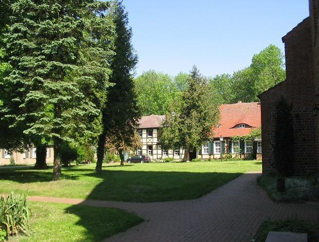 Kloster/Stift Marienfließ, Prignitz, Brandenburg. Park und Stiftsgebäude.